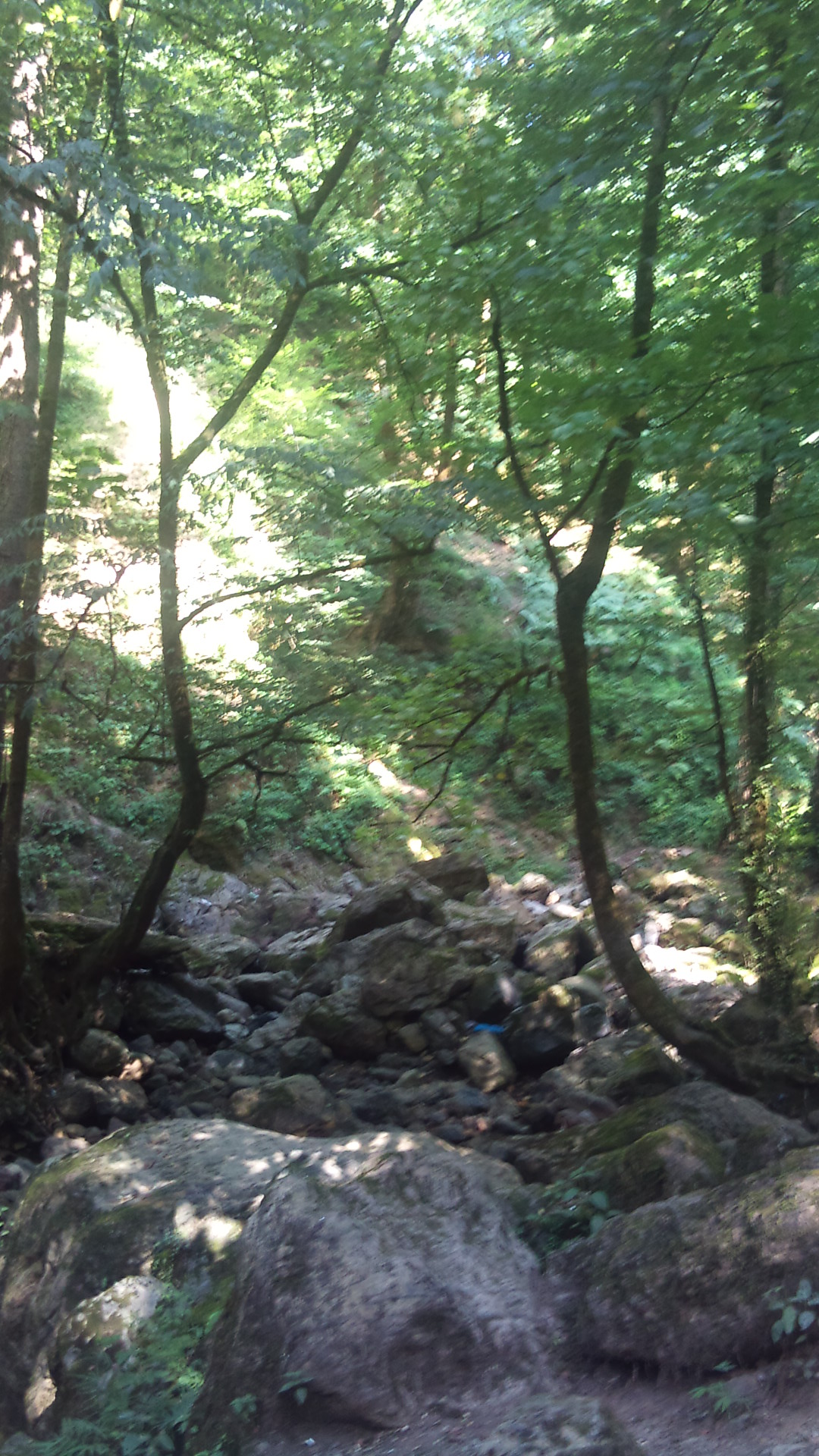 جنگل گیلان